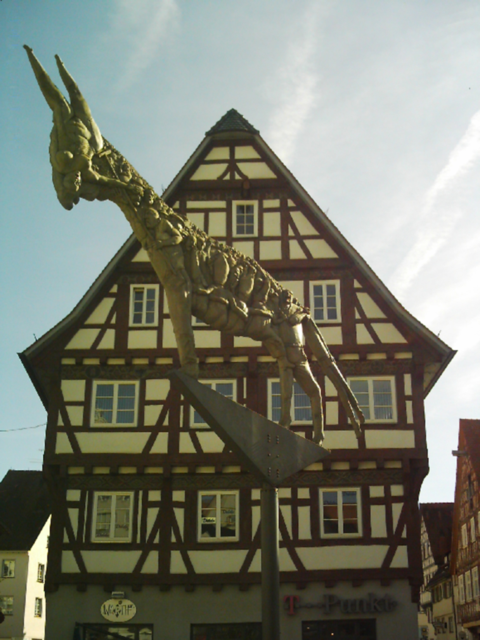 Eselsskulptur von Peter Lenk (nach Des Esels Schatten), Marktplatz, 88400 Biberach an der Riß, Oberschwaben, Deutschland